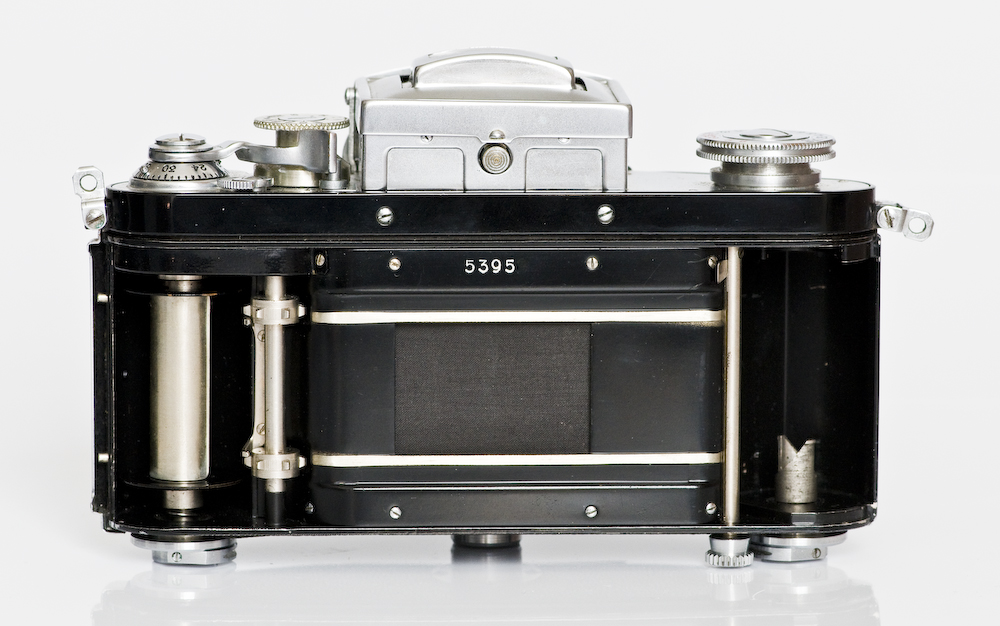 Ihagee Kine Exakta Typ 3 Rückansicht mit geöffneter Rückwand